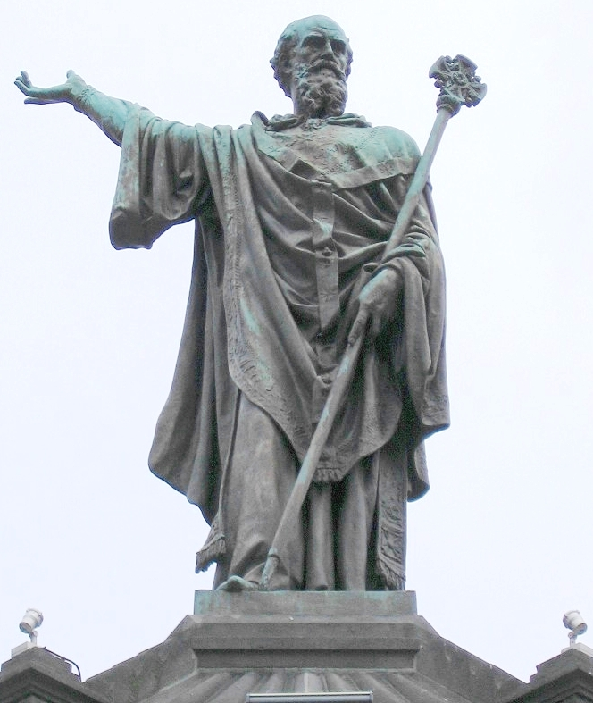 Denkmal für Urban II. auf der Place de la Victoire in Clermont-Ferrand. Sculptor : Henri Gourgouillon